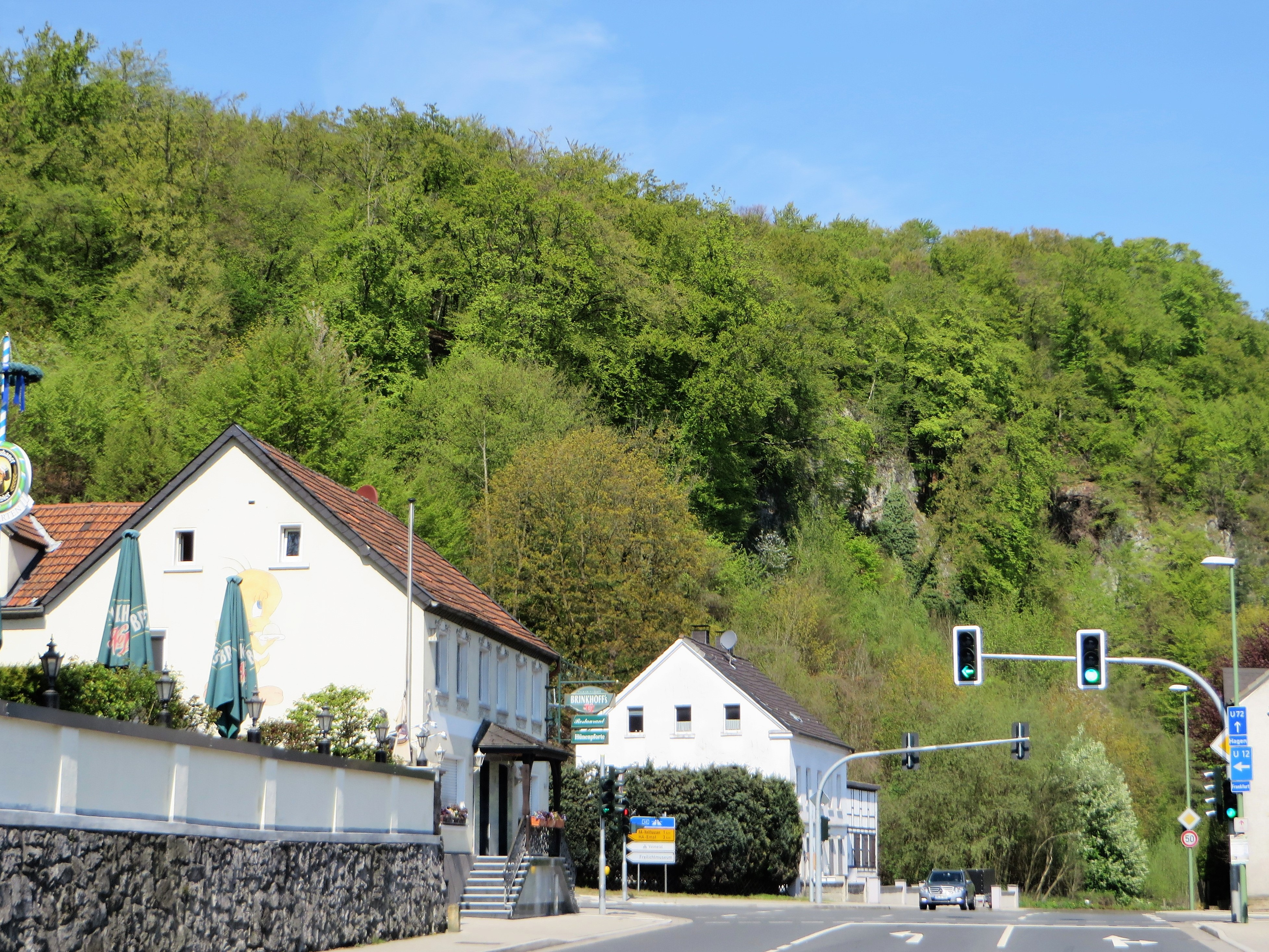 Naturschutzgebiet HA-002 „Mastberg und Weißenstein“ in Hagen-Holthausen. Blick von der Hohenlimburger Straße (B 7) in Höhe Restaurant Hünenpforte auf den offenen Kalkfelsenhang des Weißensteins (189 m). Auf dem geschützten Bereich befinden sich seltene Waldmeister- und Orchideen-Buchenwaldbestände sowie Schlucht- und Hangmischwald. Es handelt sich um den größten zusammenhängenden Laubwaldkomplex im Hagener Raum mit Resten von Halbtrockenrasen. In dem Gebiet mit Kalkfelsen und Felsspaltenvegetation befinden sich auch nicht touristisch erschlossene Höhlen, wie z. B. die archäologisch bedeutende Blätterhöhle. Am Fuße des ca. 70 Meter hoch aufragenden Massenkalkkegels „Weißenstein“ befindet sich direkt an der B 7 eine bemerkenswerte Karstquelle, der „Barmer Teich“. Im Westen grenzt an das „NSG-Mastberg und Weißenstein“ das Naturschutzgebiet „Temporärer Mastberg“.